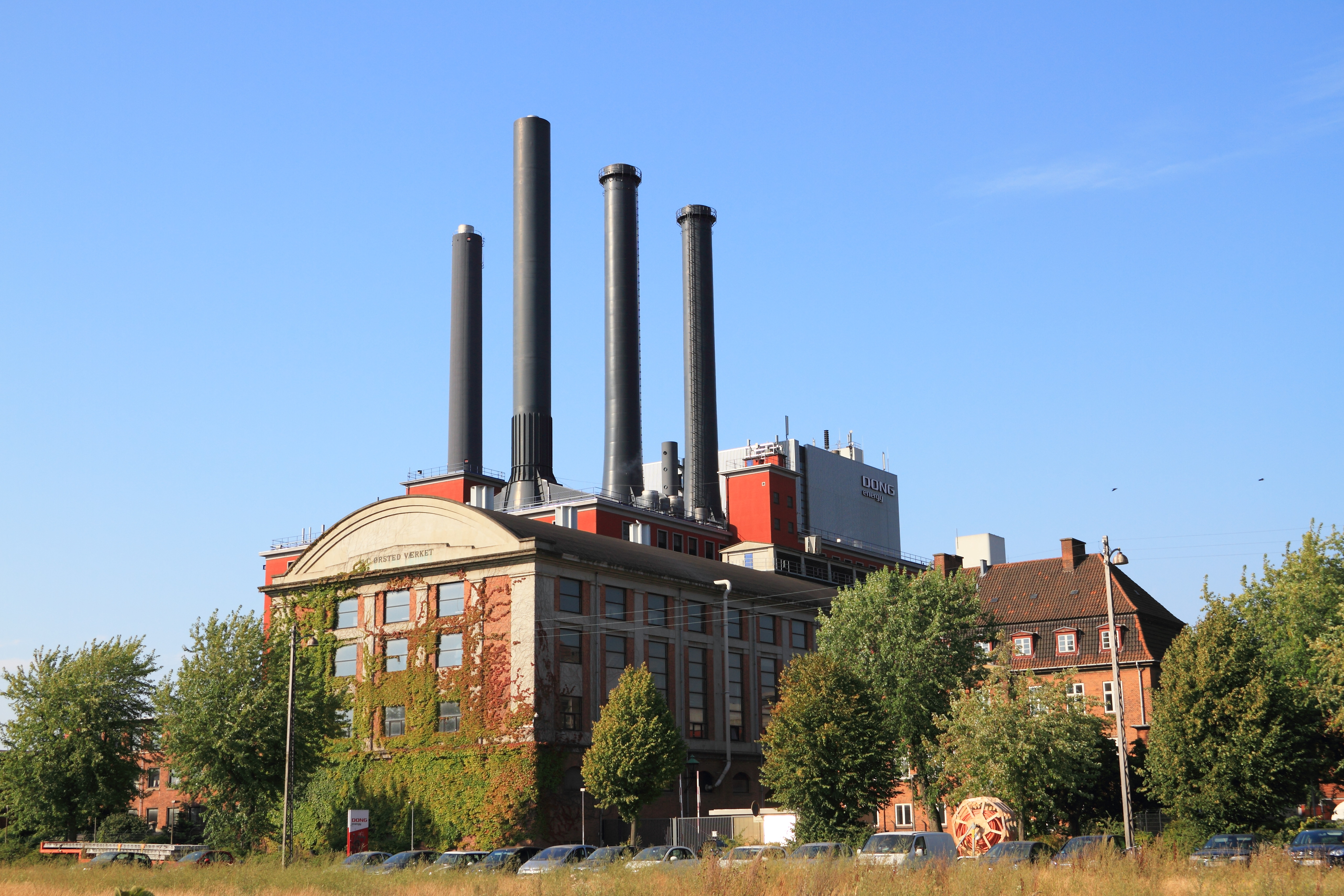 Das Kraftwerk H. C. Ørstedværket von DONG Energy in Kopenhagen.